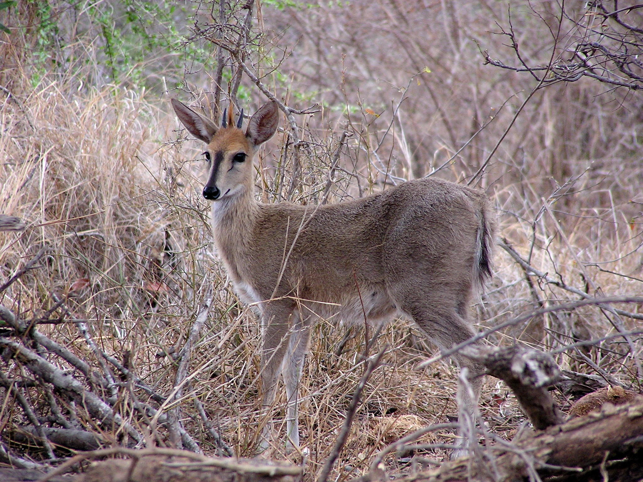 Common Duiker (Sylvicapra grimmia), Krüger National Park, Südafrika